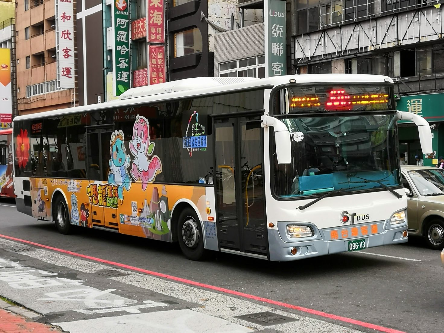 南台灣客運 HINO HS8JRVL-UTF 大客車 096-V3